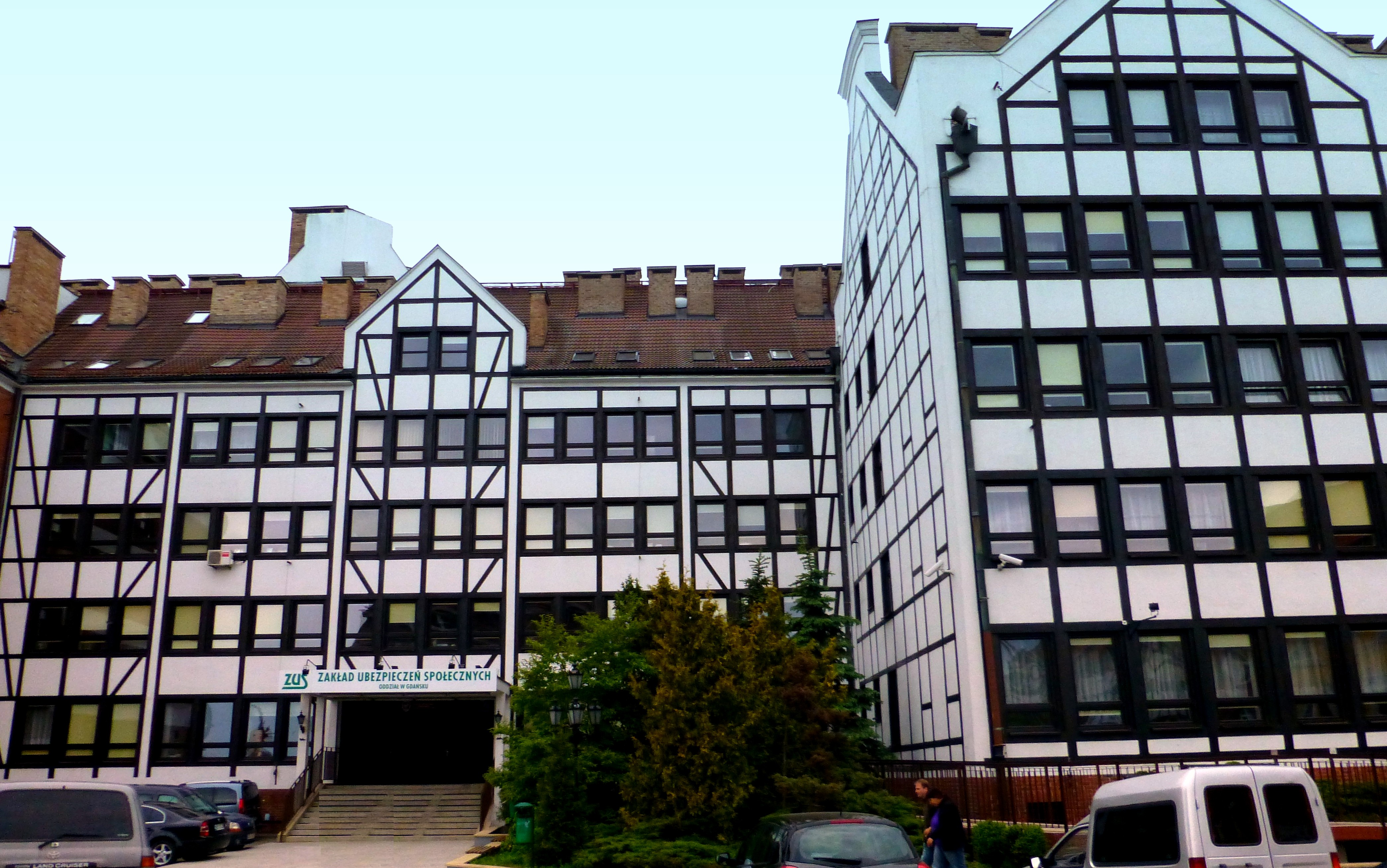 Danzig - Sozialversicherung --- Zakład Ubezpieczeń Społecznych